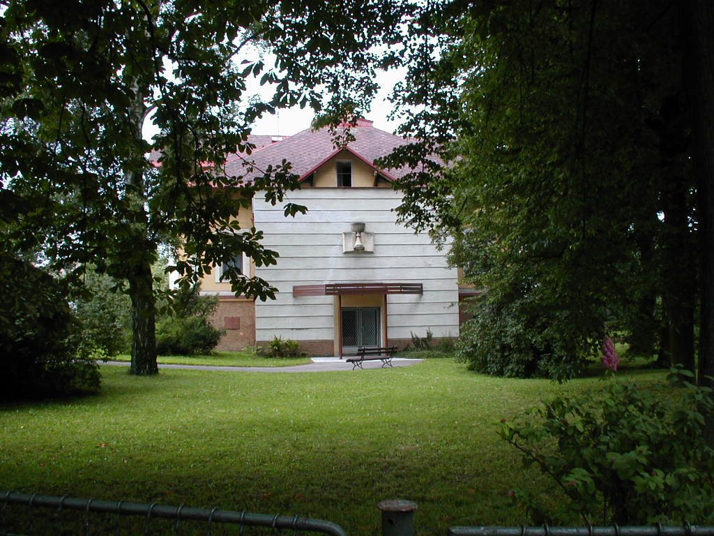 Sborový dům Farního sboru Českobratrské církve evangelické v Zábřehu, U Vodárny 545/2.